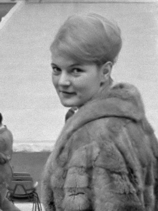 Sterren in de IJsshow "Holiday on Ice " Charlotte Balla, Hanna Launel , Hanna Walter , M. Simone , Liz Kaufmann en R. Sodoma 13 maart 1961